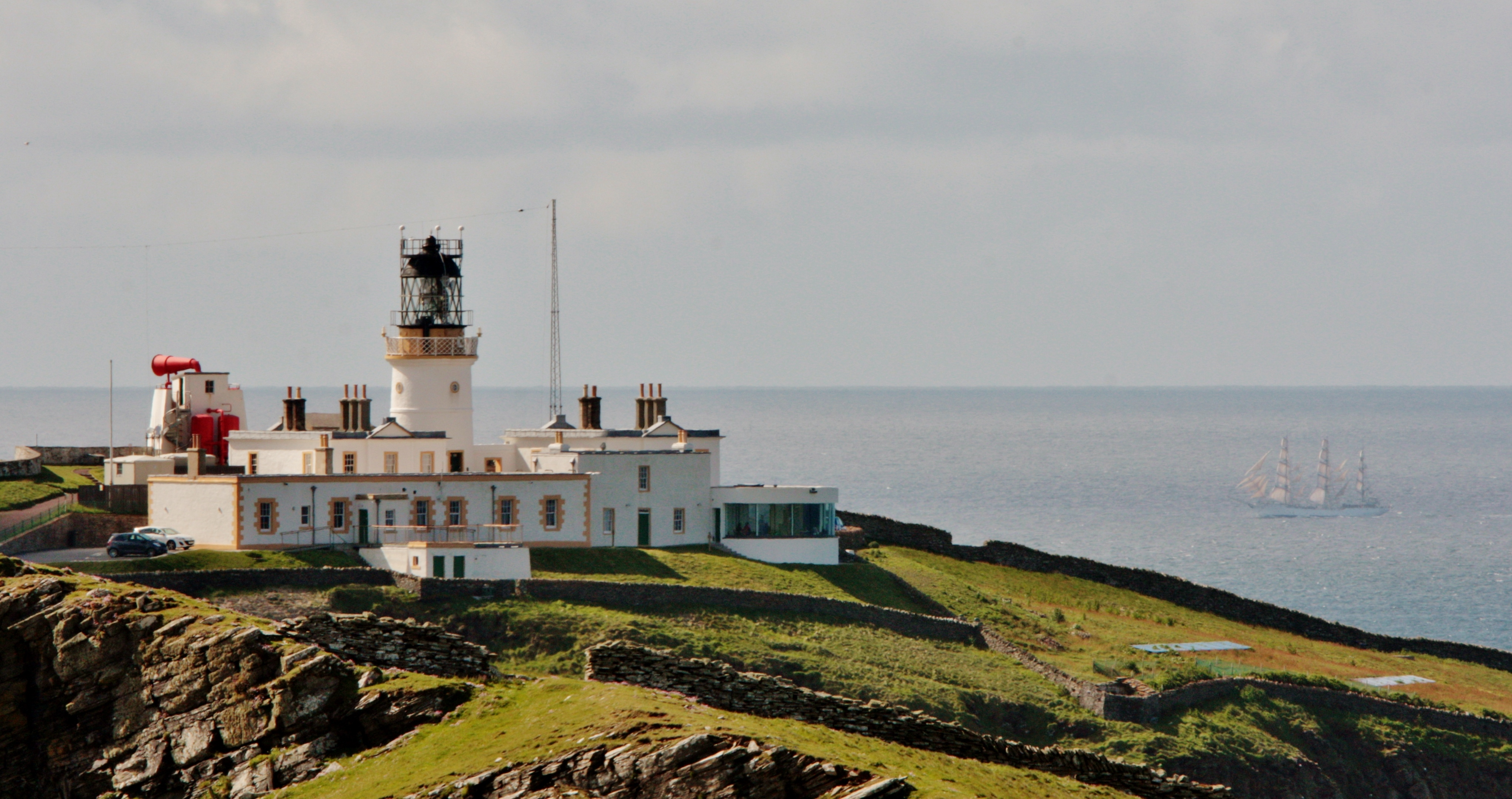 Passing Sumburgh Head